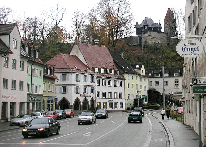 Burghalde Kempten (Allgäu). Ansicht von Nordosten. Eigene Aufnahme, Nov. 2006 / Burghalde (Castle) at Kempten (Allgäu, Bavaria, Germany). View from the northeast. Own photo, Nov. 2006